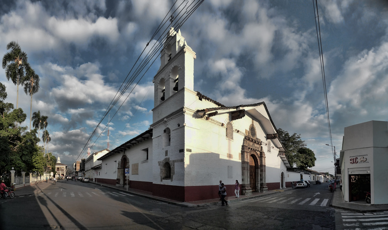 Sector Antiguo de la ciudad de Buga